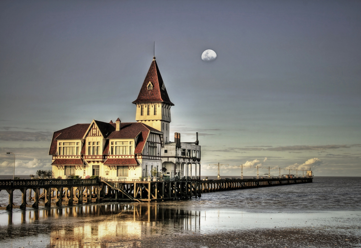 Club de pescadores, Argentina View On Black